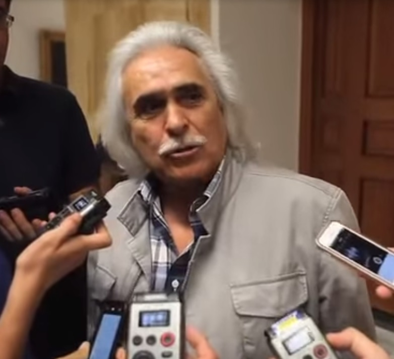 Rafael Gómez «Sandokán» 2013.